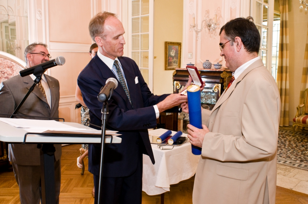 Serban Nichifor: Ofiter al Ordinului Coroanei (Belgia), 2008Română: Serban Nichifor: Officer of the Order of the Crown (Belgium), 2008